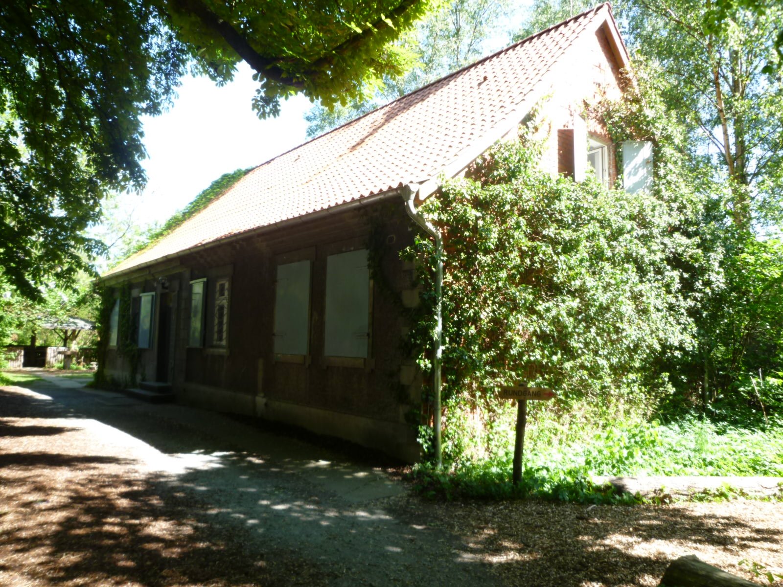 Drömlingsinformationsareal Kämkerhorst bei Calvörde, 2011, Drömlingsinformationshaus